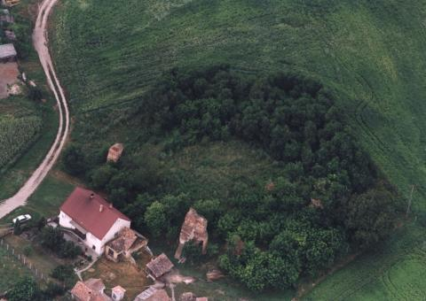 Döbrököz, Hungary, aerial photography